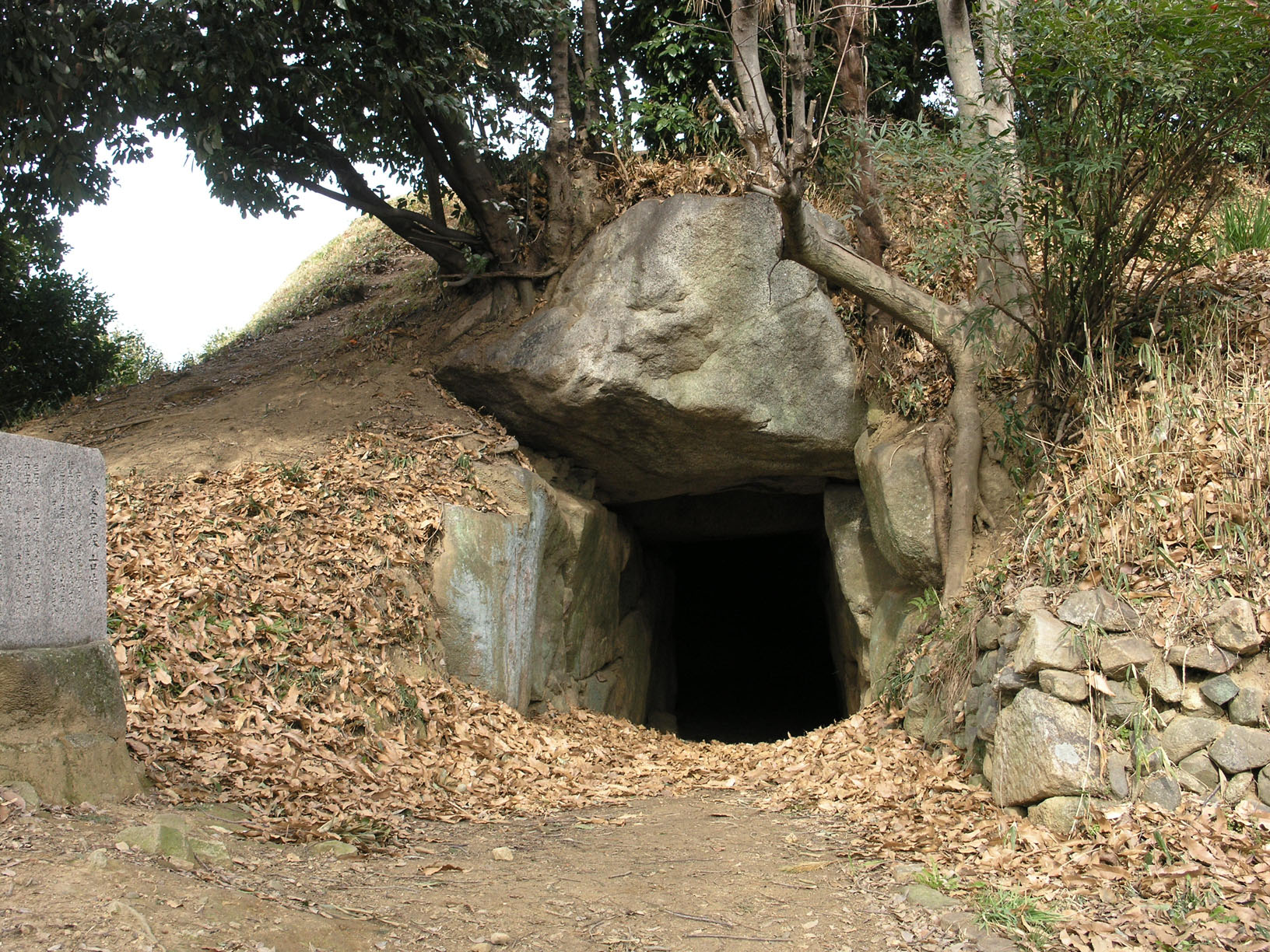 Atagozuka kofun in Yao, Osaka, Japan